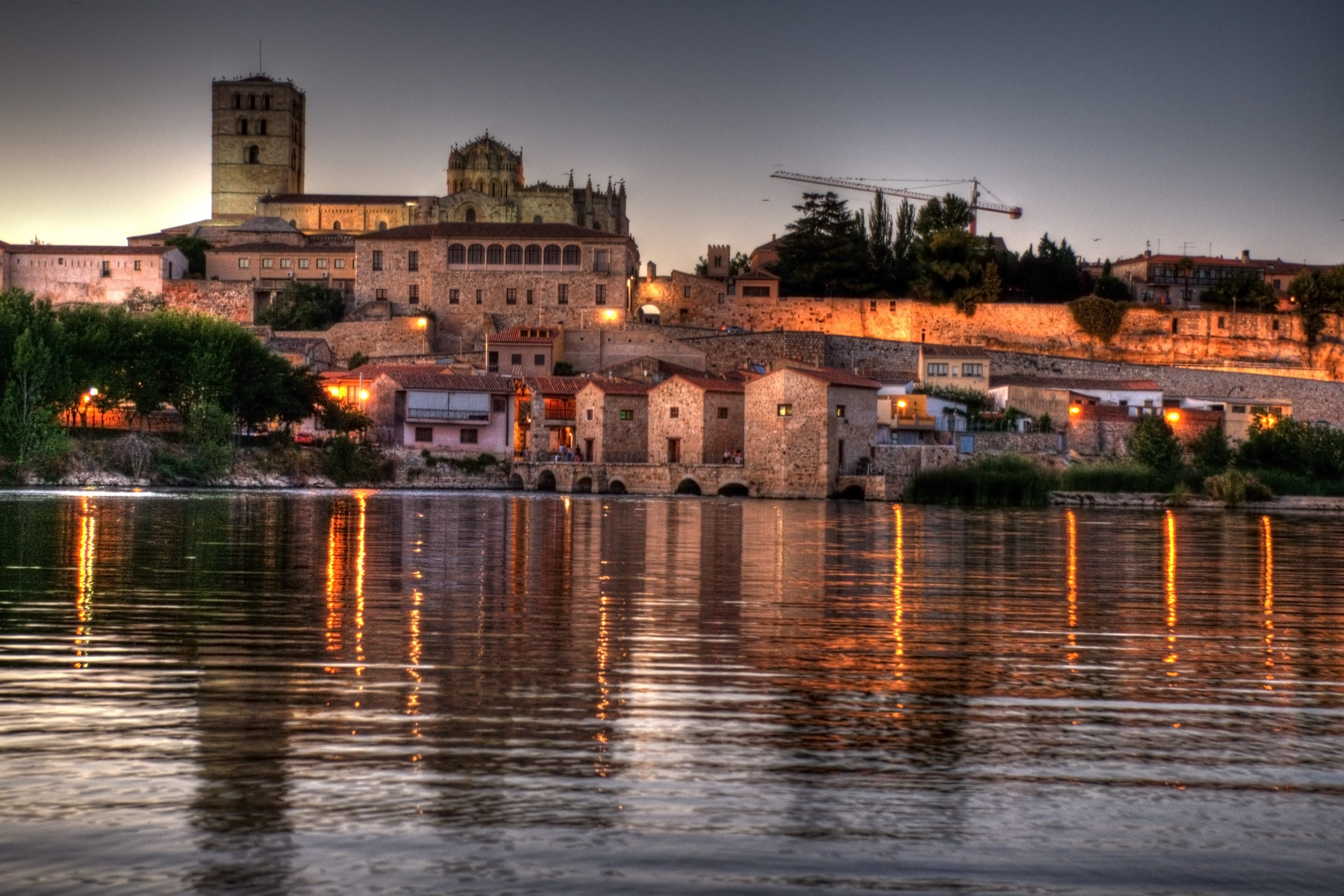 Zamora y el Duero